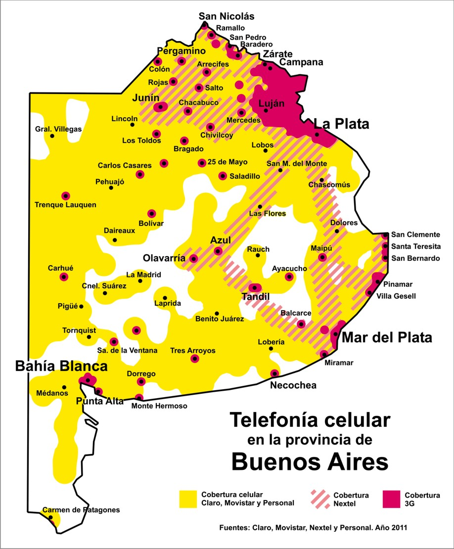 Cobertura de telefonía celular en la provincia de Buenos Aires, Argentina.